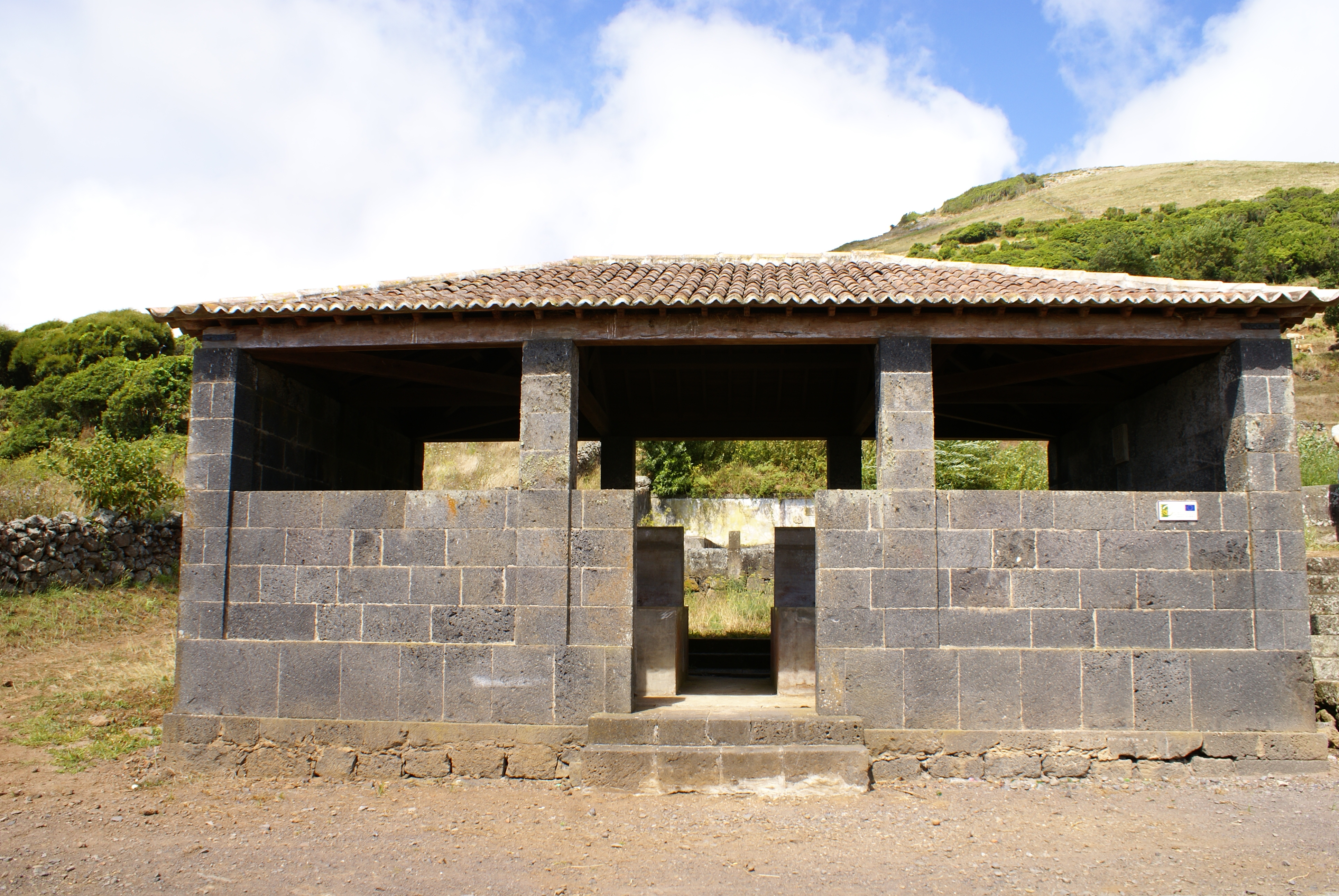 Chafariz público das Pedras Brancas, ilha Graciosa, Açores, Portugal